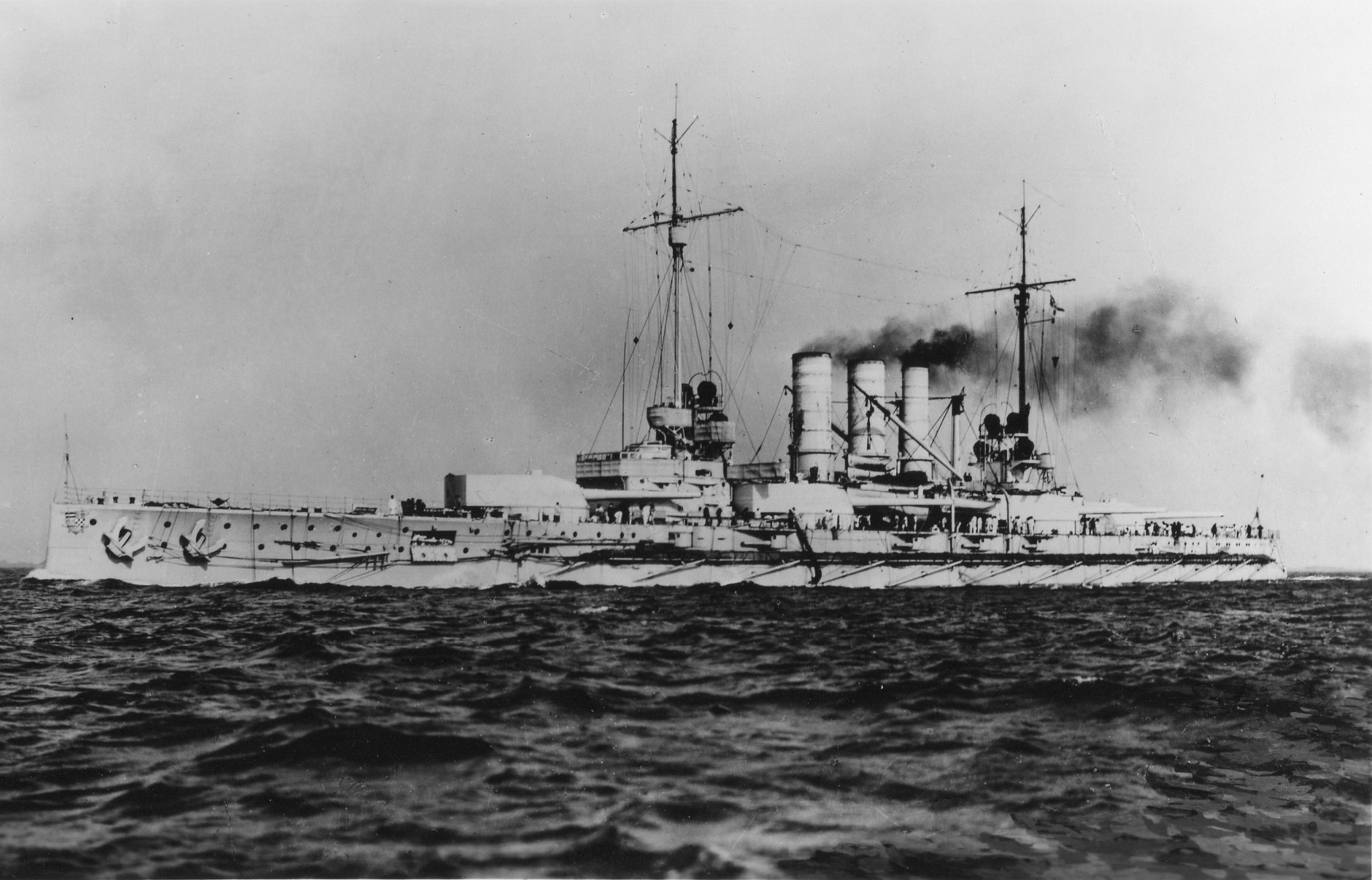 Linienschiff SMS OLDENBURG um 1910. Aufnahmeort und Aufnahmedatum unbekannt